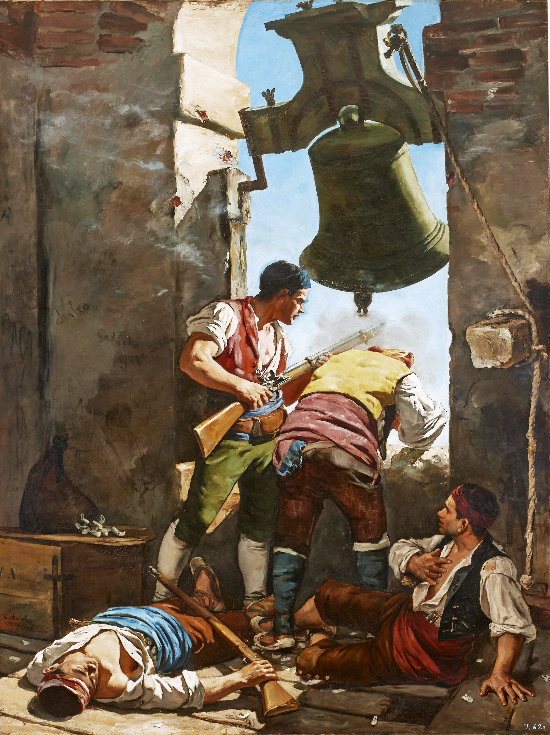 La obra representa al grupo de hombres que se hicieron fuertes en el convento de San Agustín de Zaragoza y resistieron los ataques del ejército francés durante los Sitios de Zaragoza, que tuvieron lugar durante la Guerra de la Independencia Española.